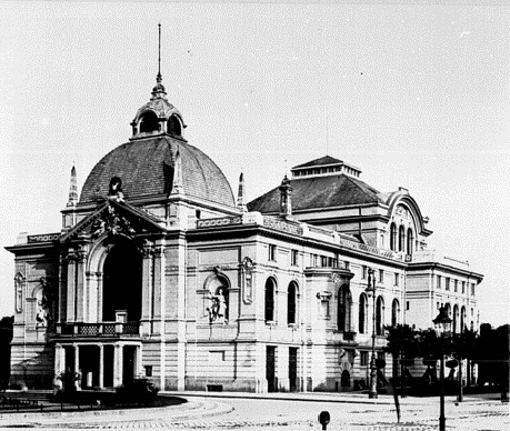 Rostocker Stadttheater in der Zeit zwischen 1900 und 1910